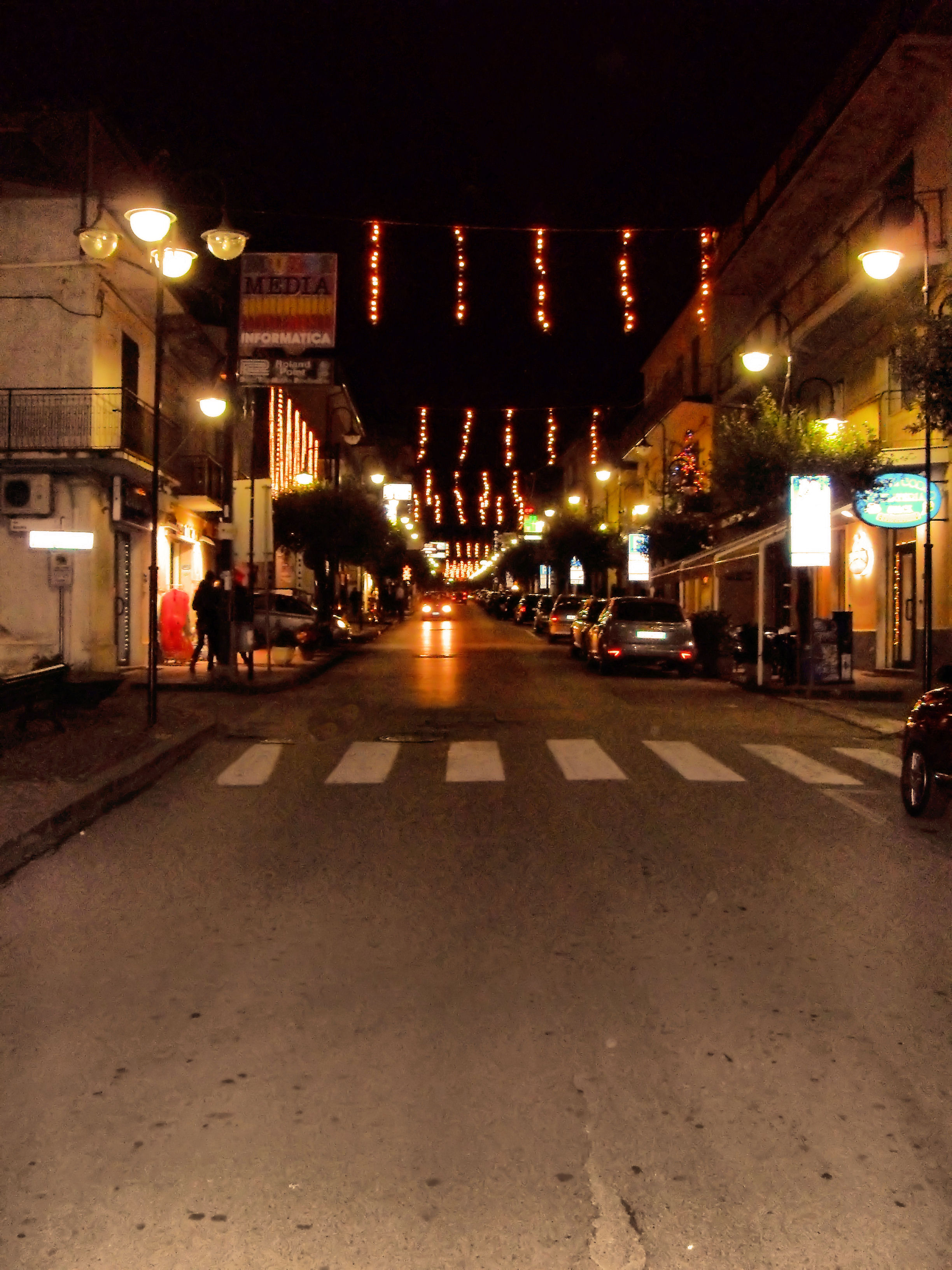 Io sottoscritto Luigi Salvatore Vadacchino, utente di Wikipedia sotto il nome di Lodewijk Vadacchino, cedo l'immagine SDC11448.JPG a Wikimedia Italia, sotto licenza CC-BY-SA, con il nome Campora_San_Giovanni_-_Corso_Italia_Feste_Natalizie_2009.jpg. L'Immagine fotografica raffigura la mia cittadina natale di Campora San Giovanni, ovvero il Corso Italia, durante le feste natalizie. Porgo come sempre i miei distintissimi saluti, con l'augurio che possiate venirmi a far visita. Vostro come sempre--12:30, 16 dic 2009 (CET)